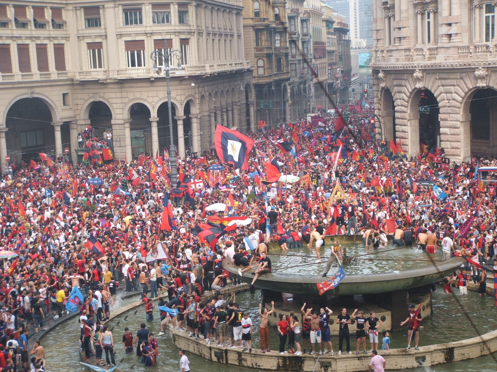 Genova, festeggiamenti a piazza De Ferrari per la promozione del Genoa CFC in Serie A